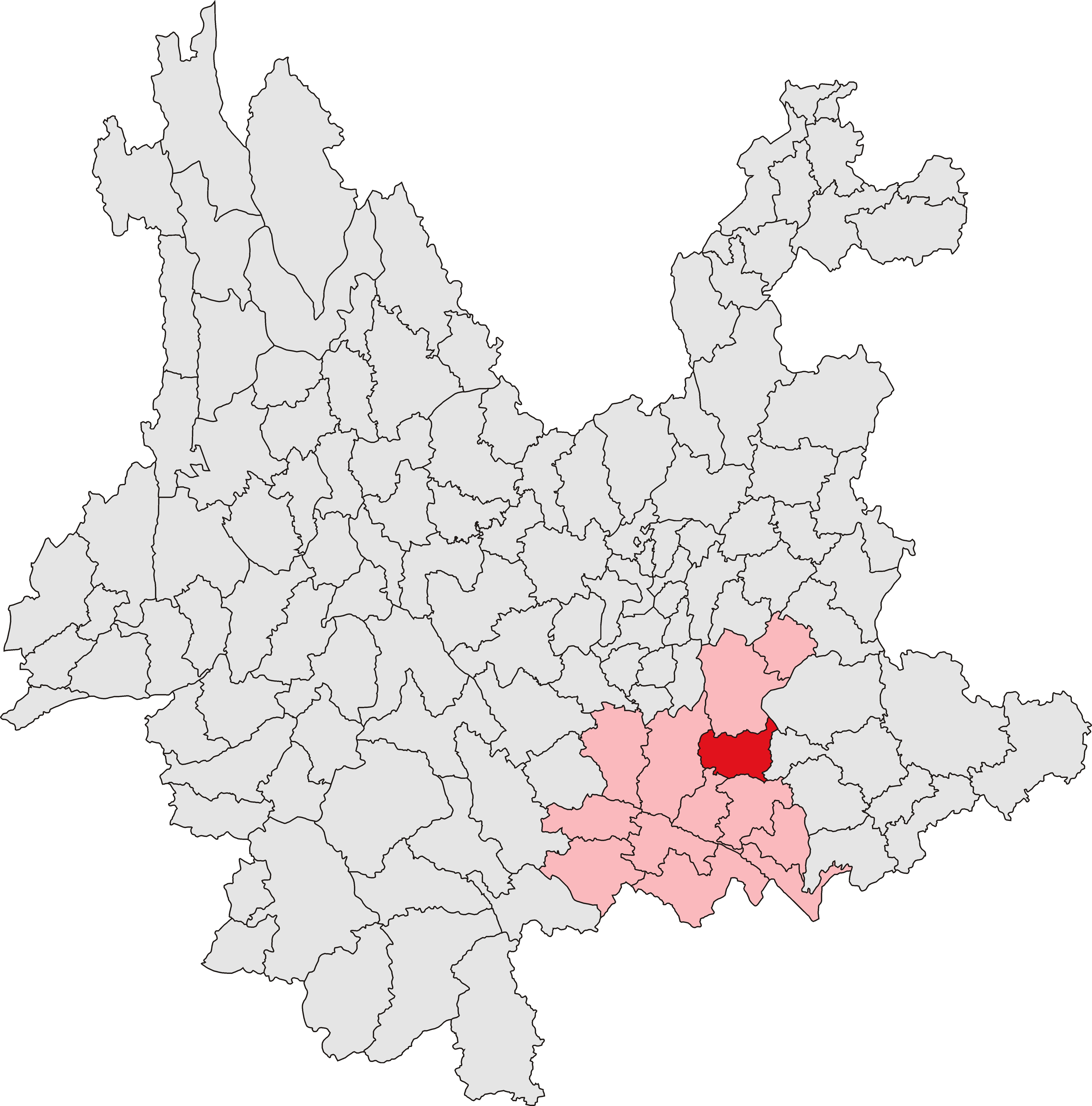 中文（中国大陆）: 开远市位置图